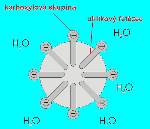 Mýdlová micela